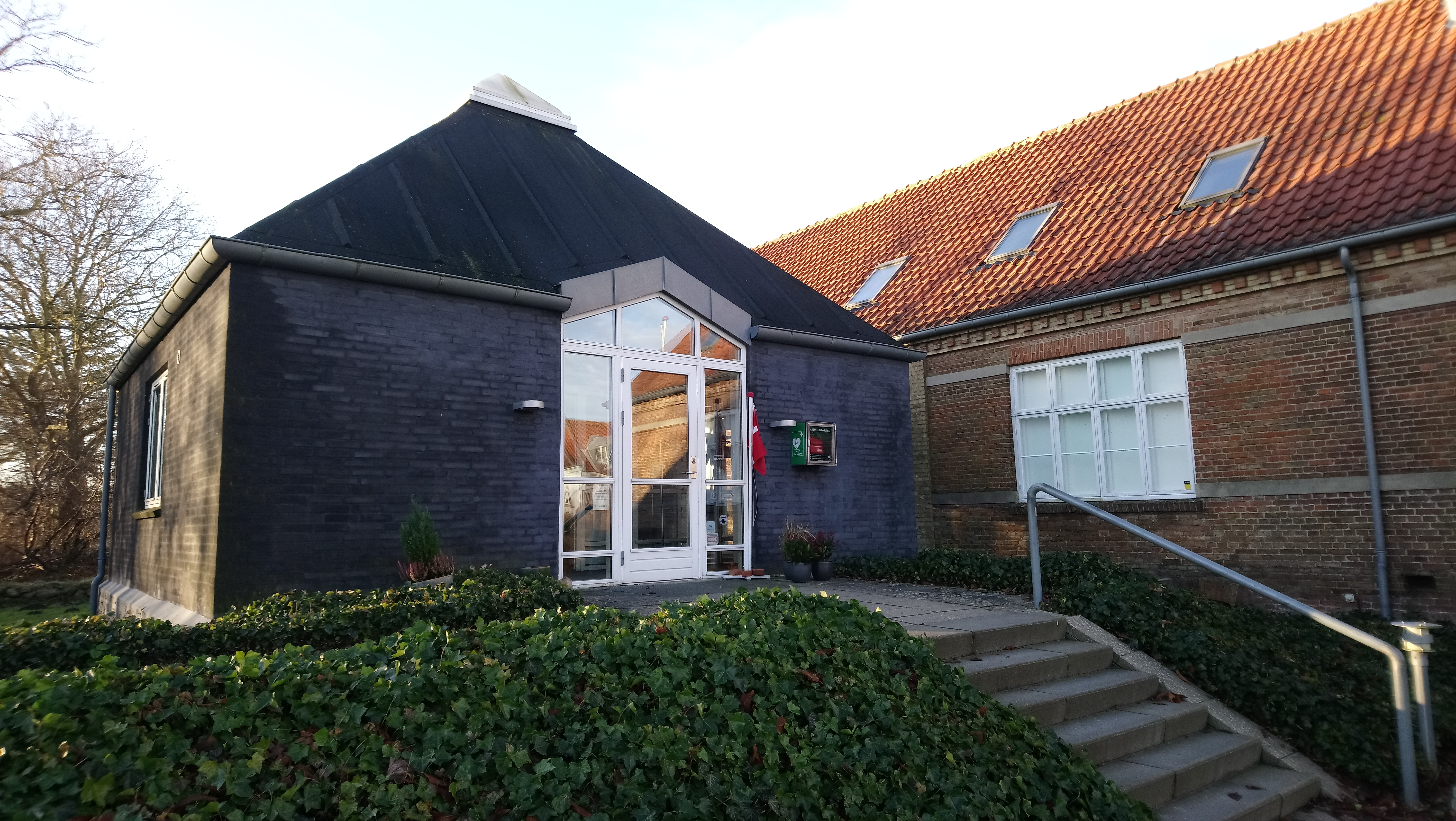 Indgangen til Museum Skanderborg.